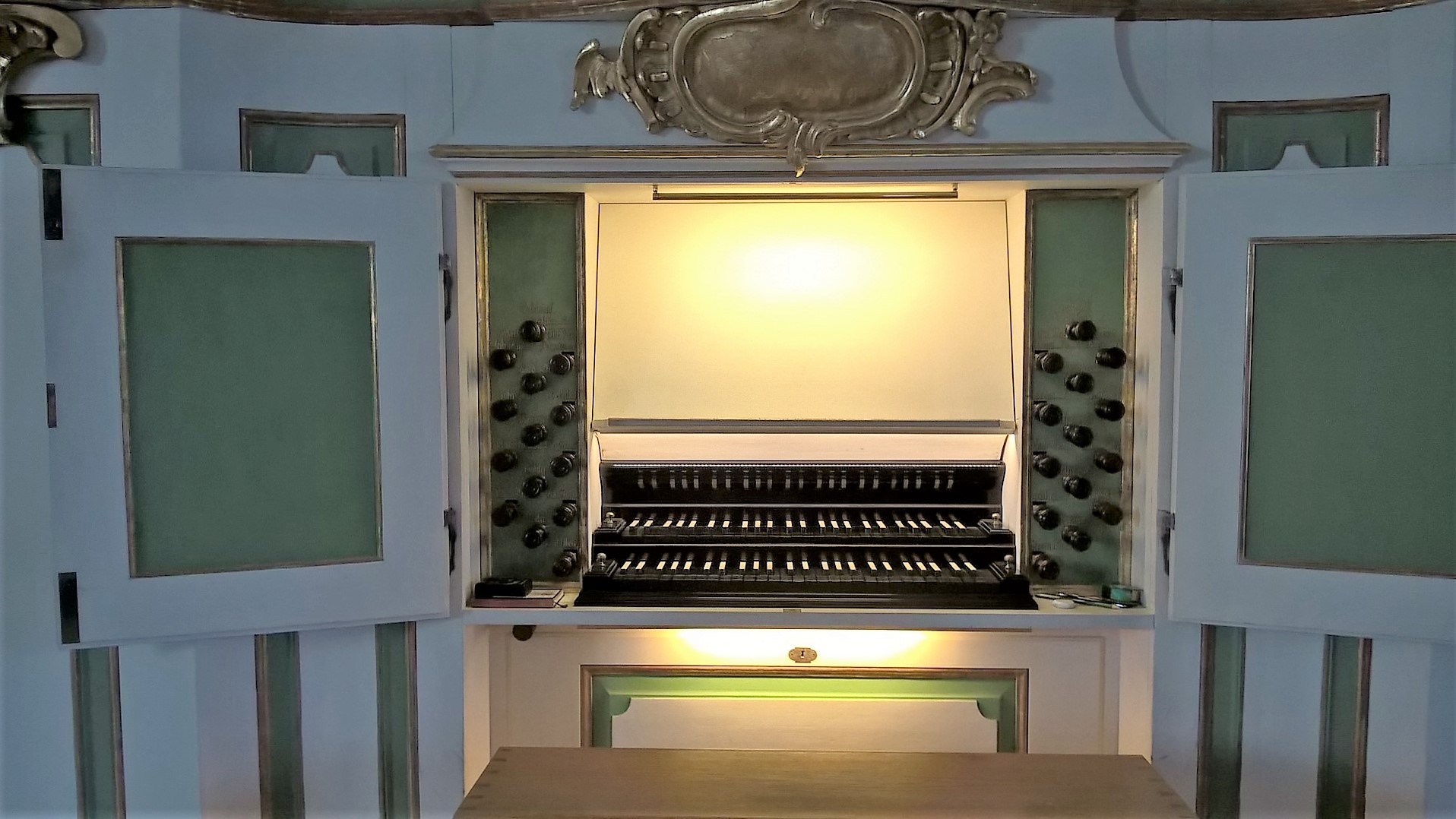 Orgel der Kirche Zur Frohen Botschaft, Berlin-Karlshorst, Deutschland